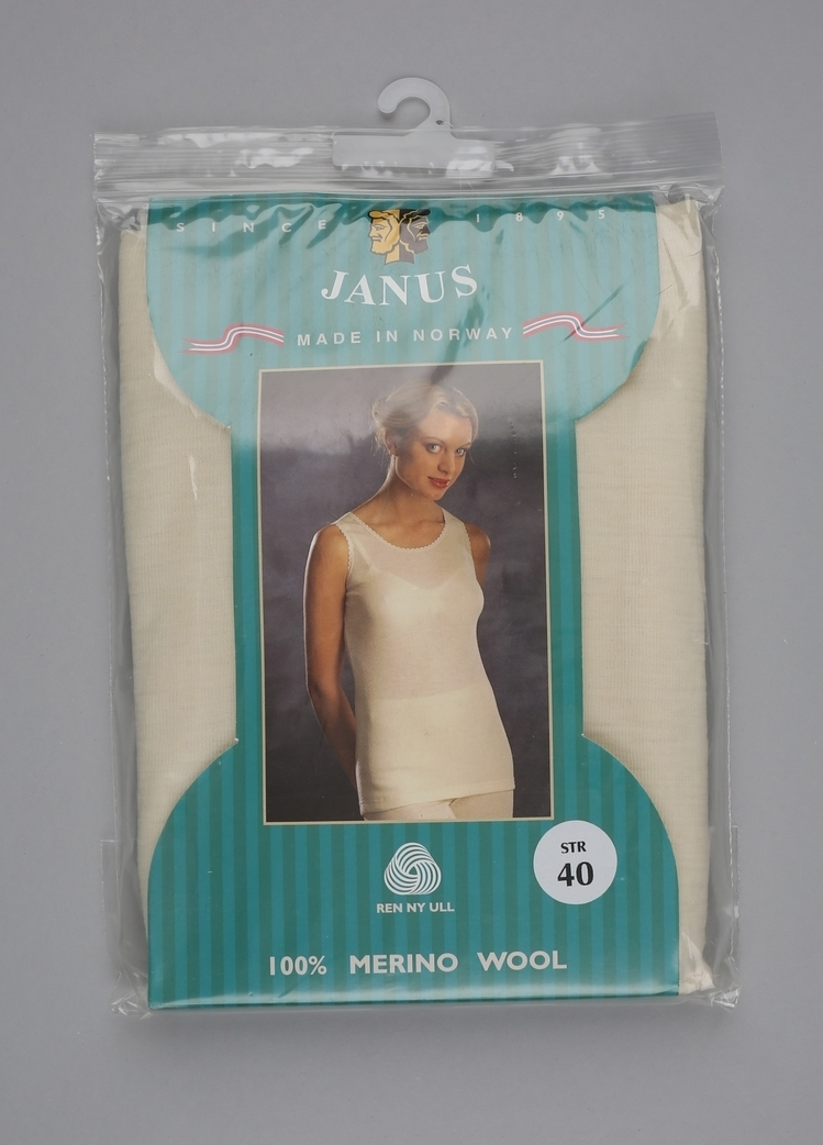 Ullundertrøye til dame, produsert av Janusfabrikken på Espeland utenfor Bergen. (NTMT.08684, Norsk Trikotasjemuseum, Museumssenteret i Hordaland).